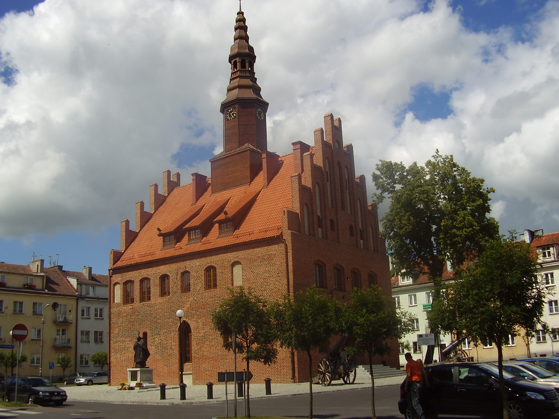 Ratusz miejski w Morągu